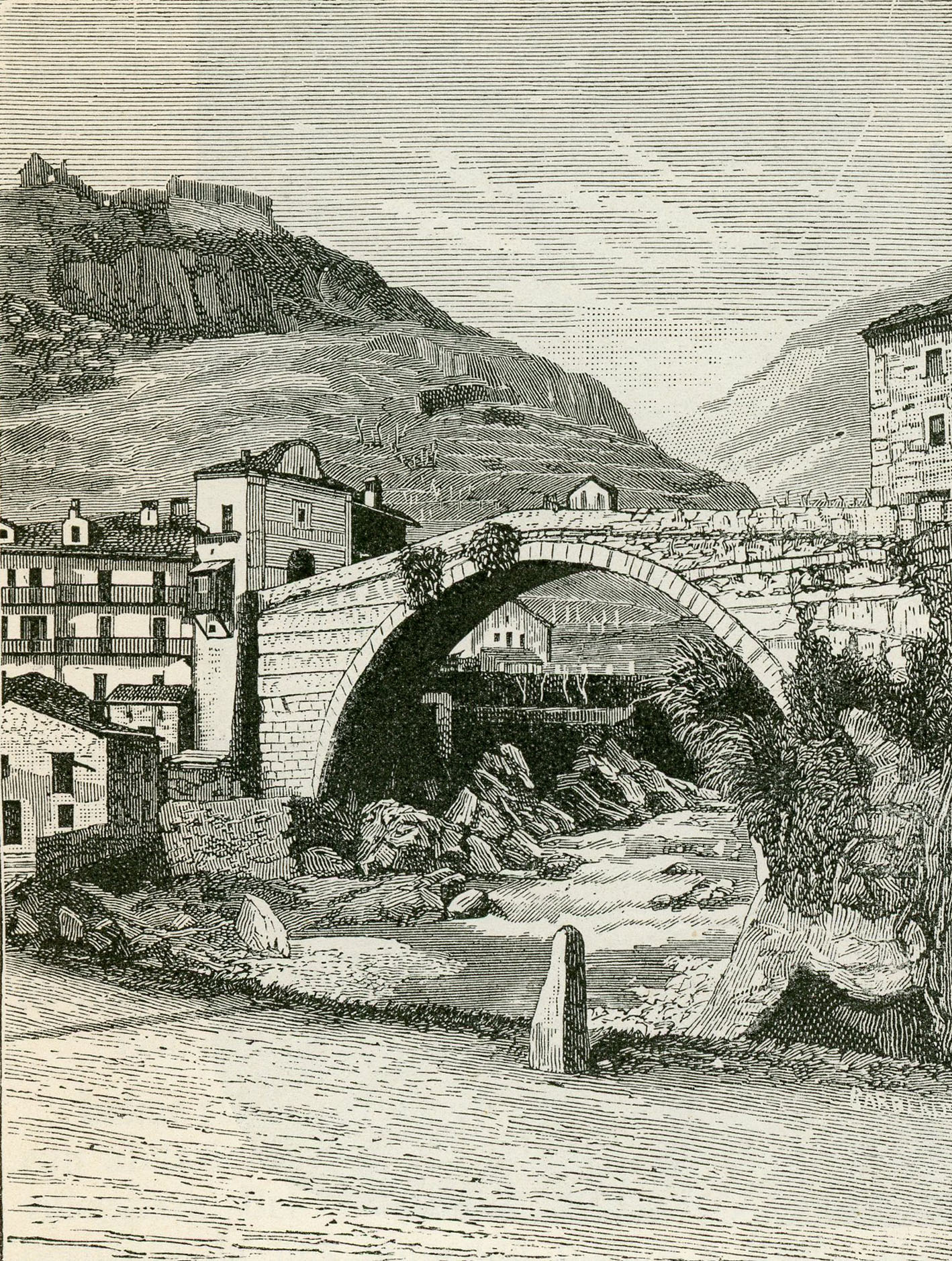 Ponte romano a Pont-St-Martin (xilografia).